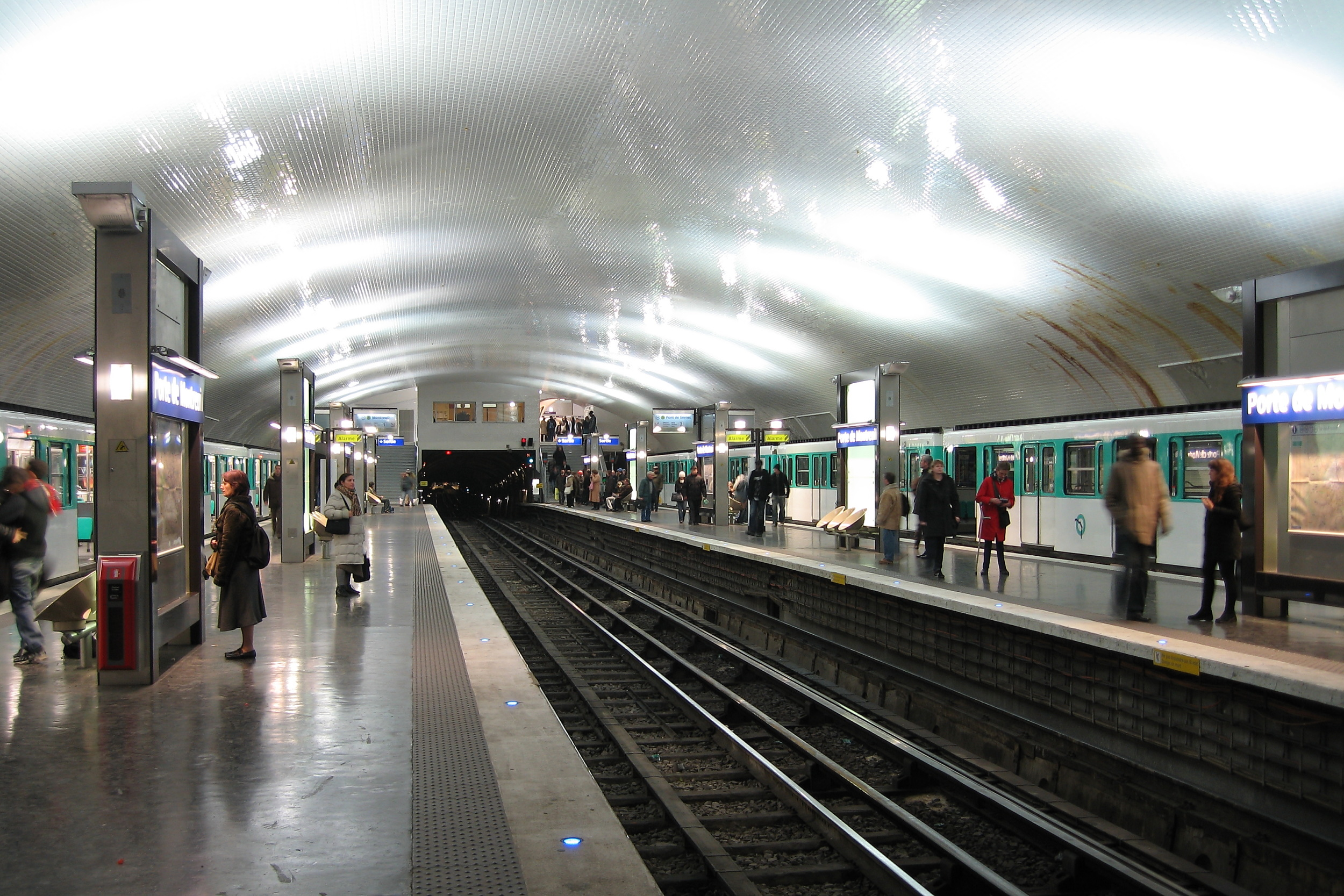 Vue générale de la station Porte de Montreuil du métro parisien.